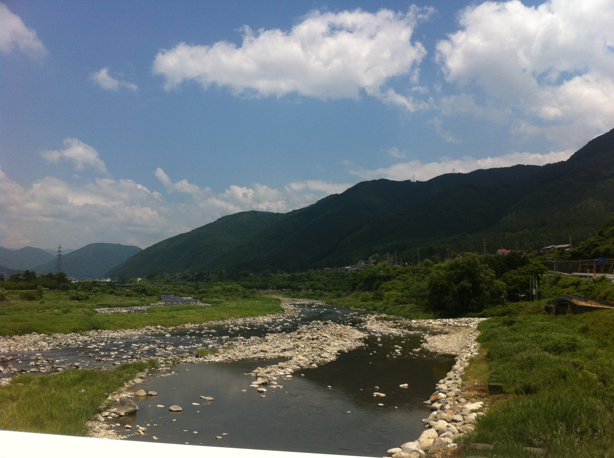 下呂市萩原町より飛騨川上流部を望む